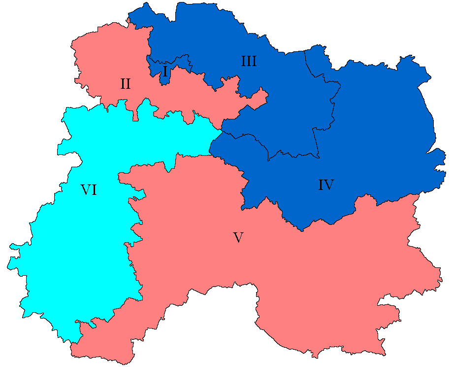 Députés de la Marne en 1988